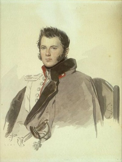 Граф Лев Викторович Кочубей (1810-1890), сын В.П.Кочубей; ротмистр, владелец знаменитой Диканьки.